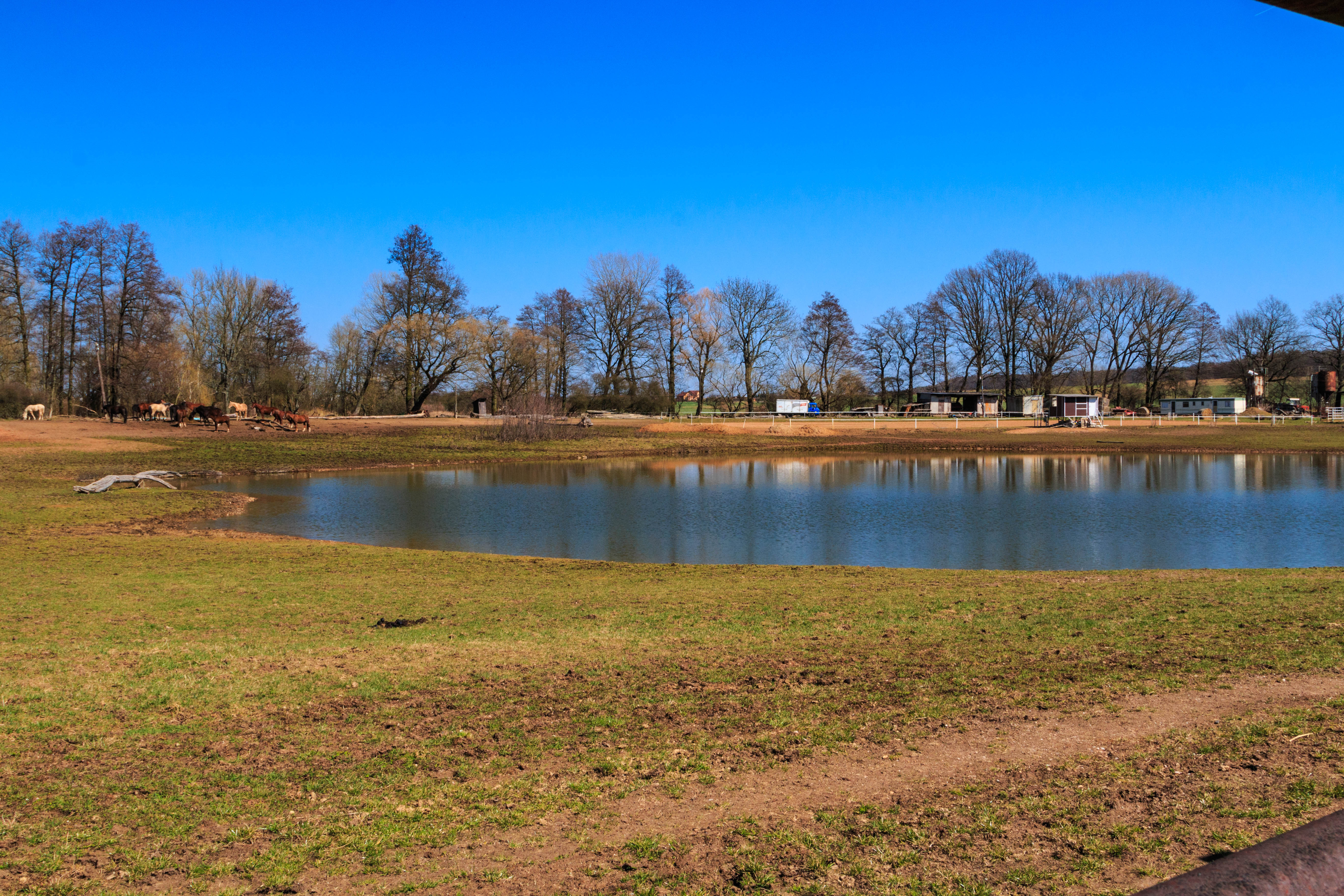 Písník u Stýskalu u obce kunčice v okrese Hradec Králové Project: Vodstvo.